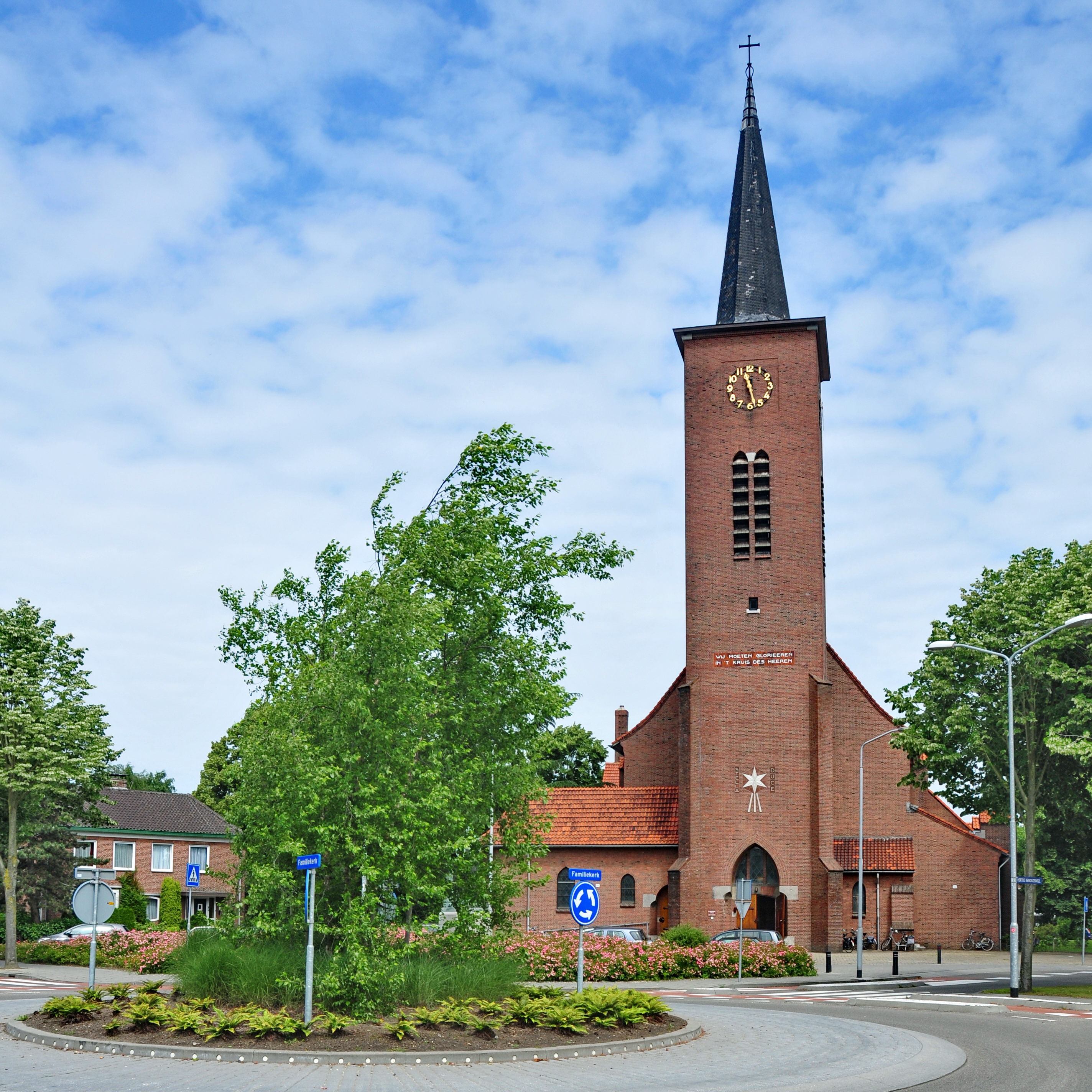 Venlo, Niederlande, 2013 Man ist versucht, solche Ansichten nur mit Weitwinkel anzufertigen (hier 18mm)